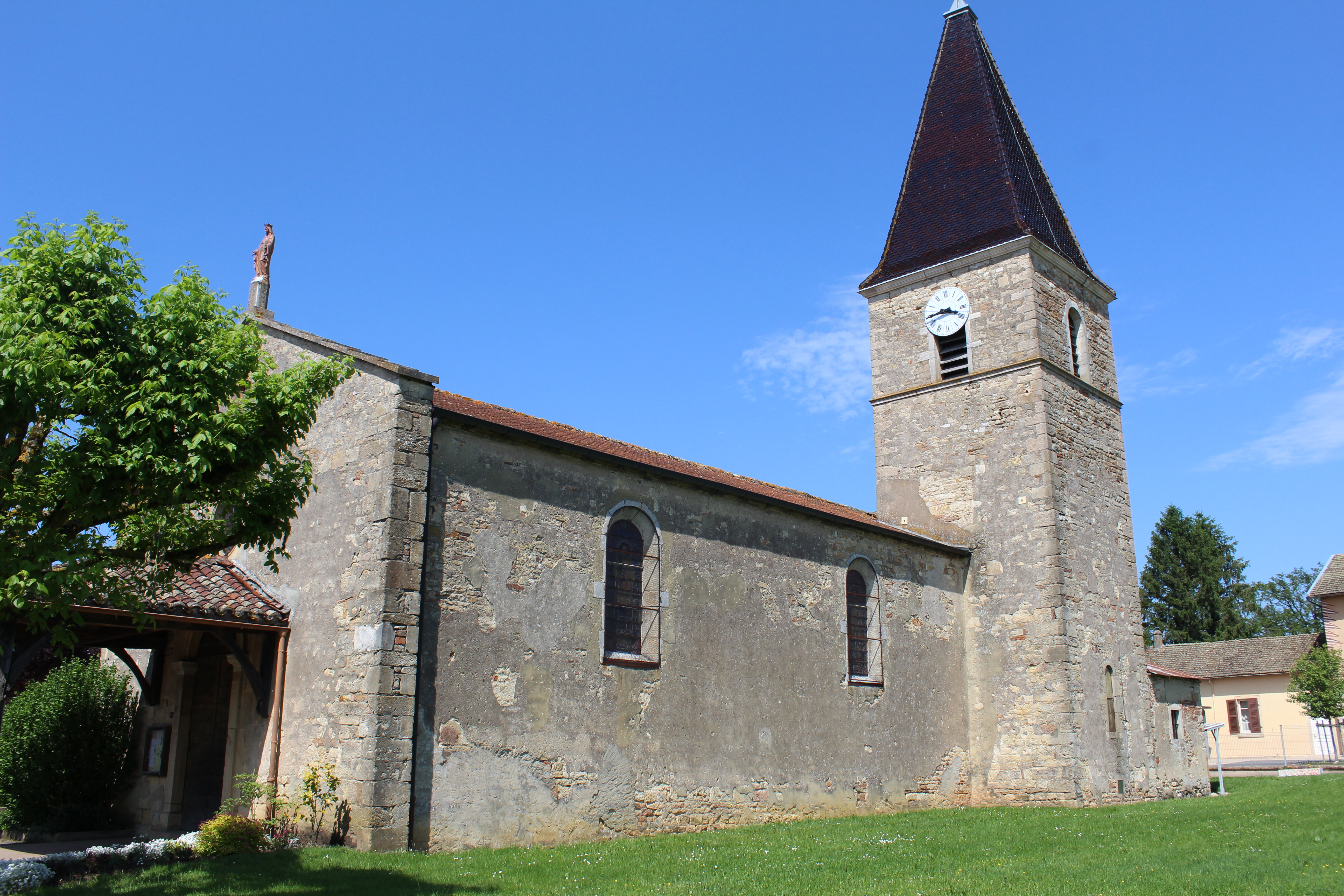 Église de Saint-Genis-sur-Menthon.